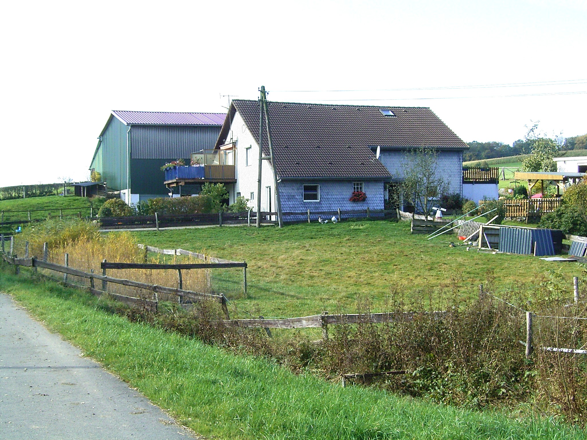 Radevormwald